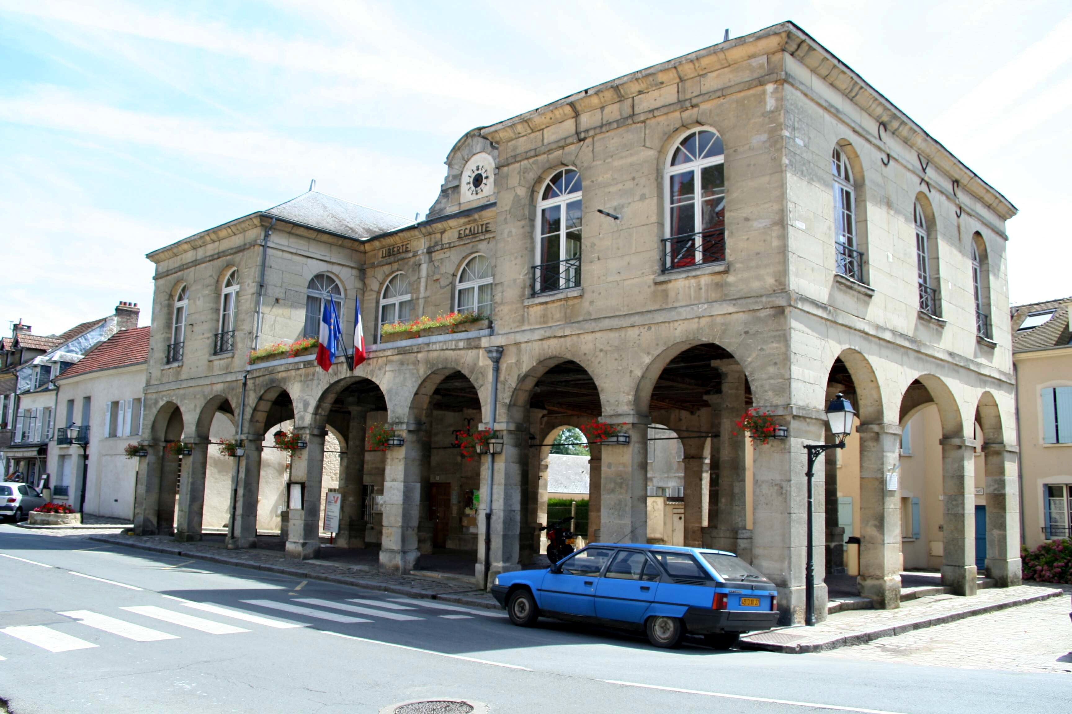 Hôtel de ville, la Roche-Guyon, Val-d'Oise (France)